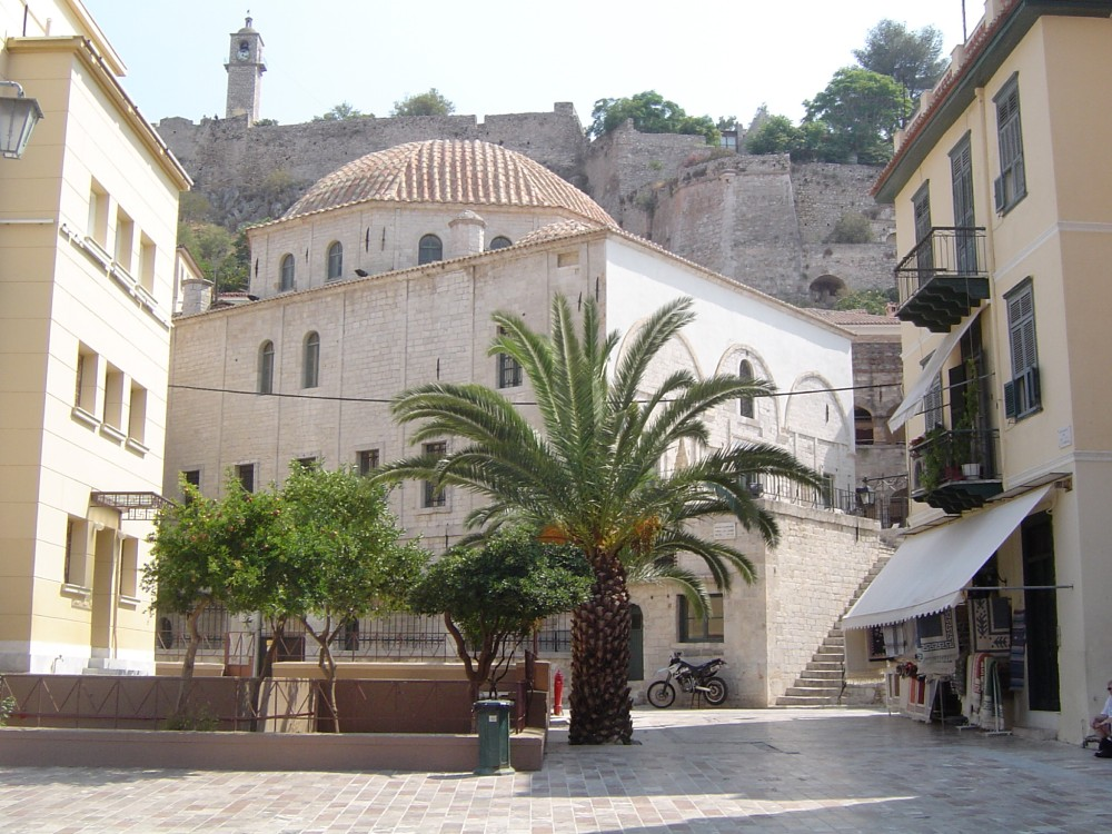 Nafplio, große Moschee (Sitz des greichischen Parlaments 1825-28